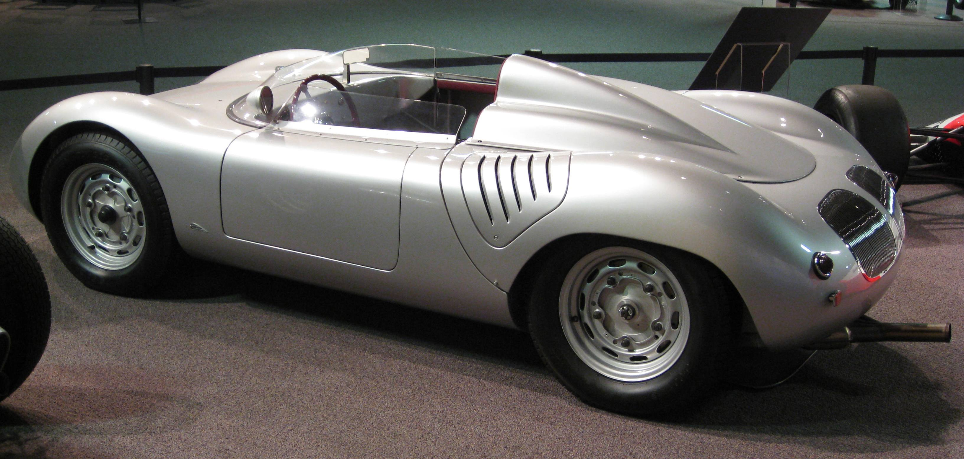 Porsche 1958 Type 718 RSK Spyder